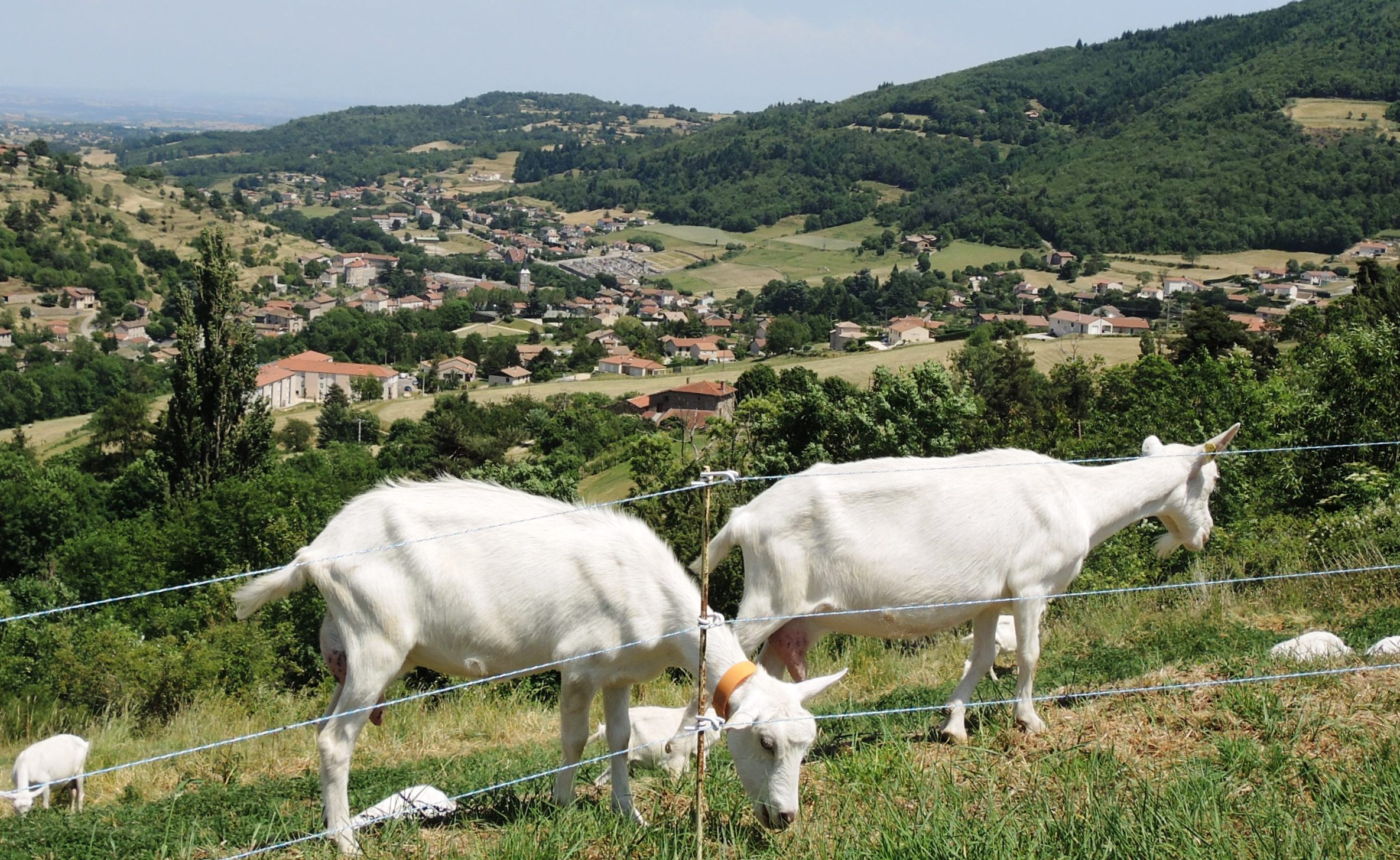 Satillieu vue générale